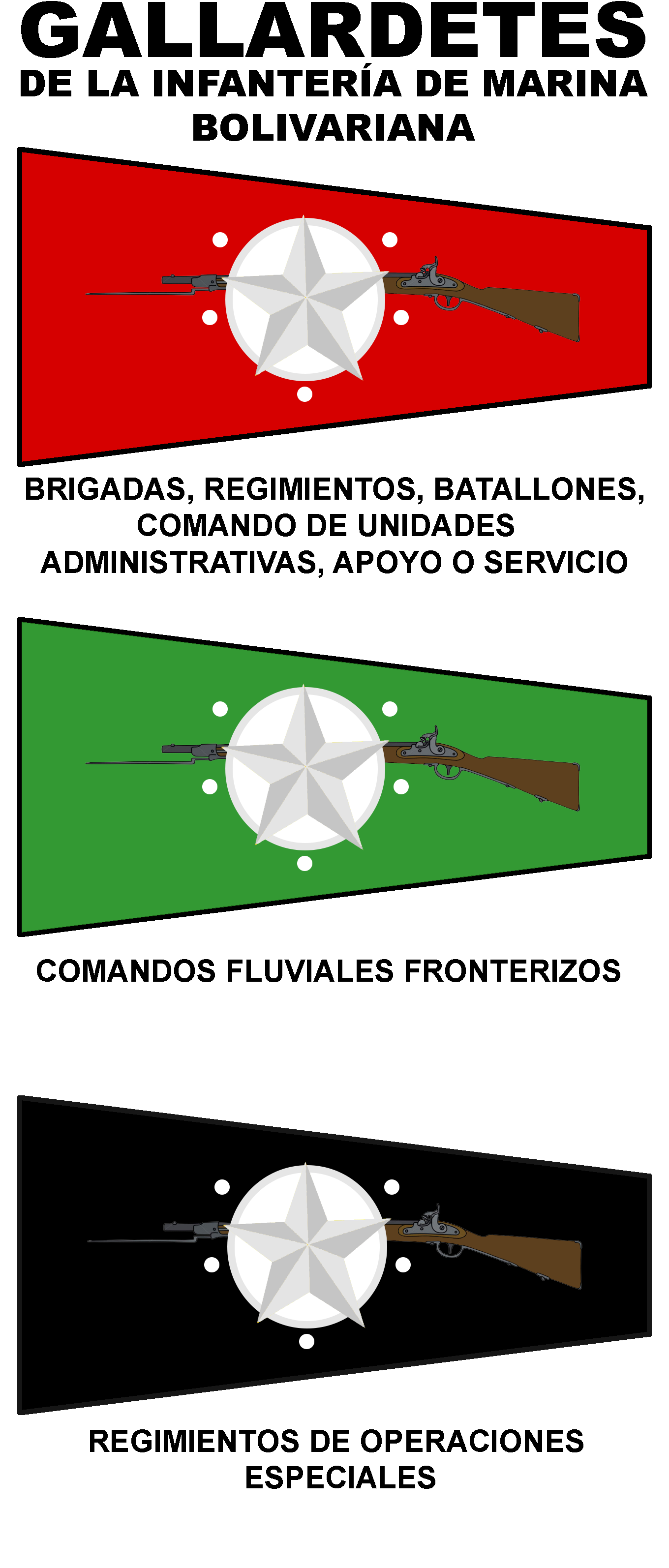 Gallardetones de la Infanteria de Marina Bolivariana